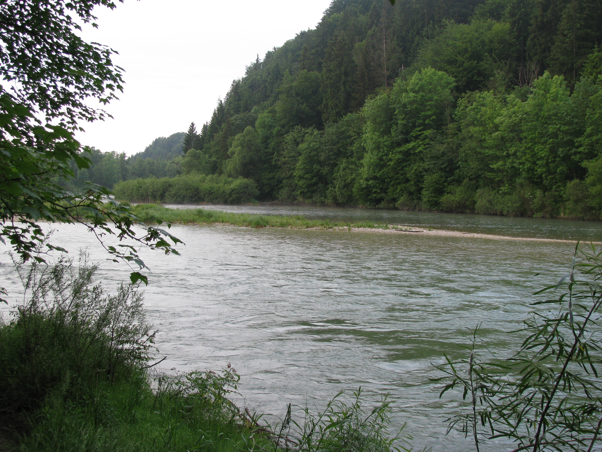 Mündung der Loisach in die Isar (vorne), bei Wolfratshausen